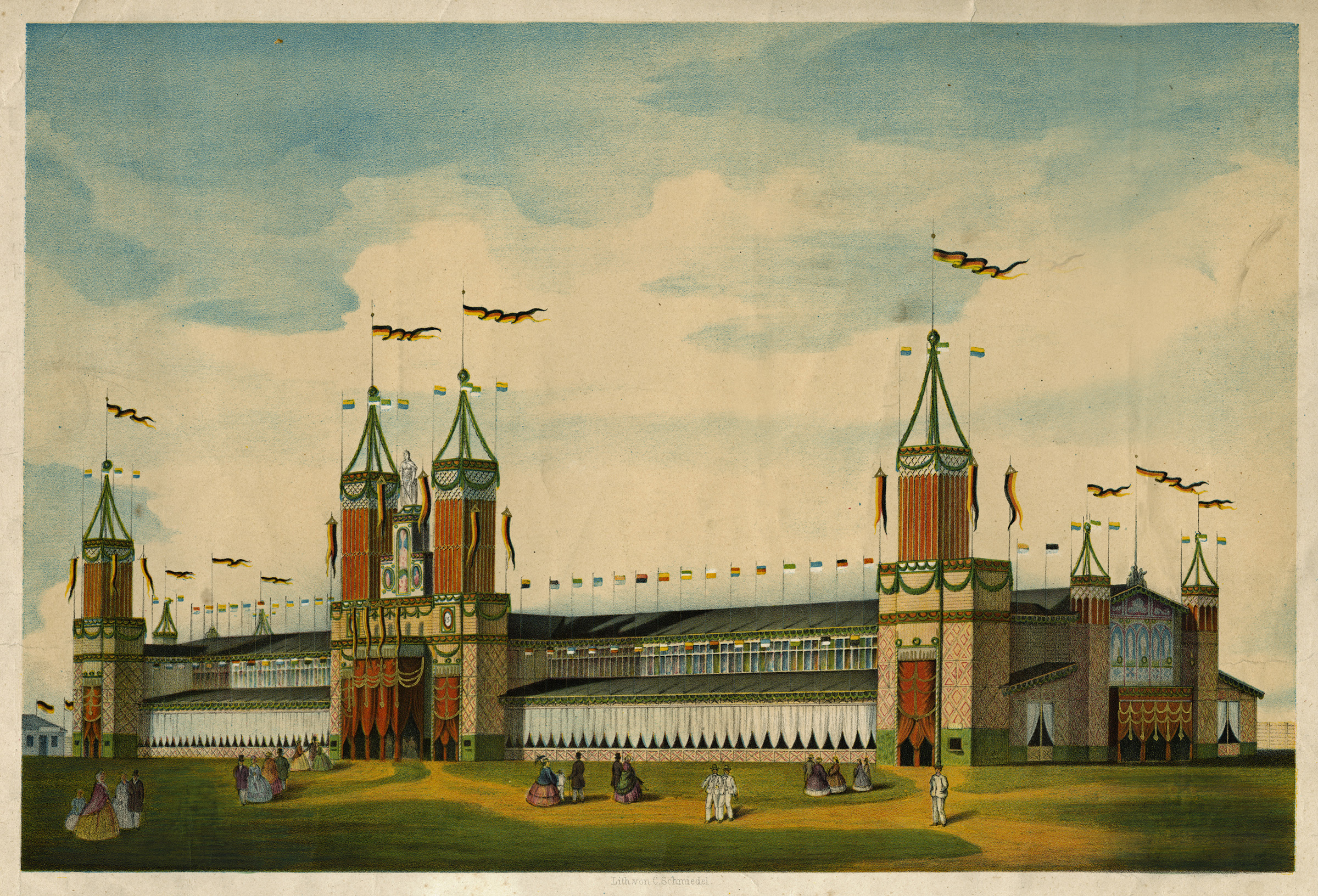 Allgemeines Deutsches Turnfest 1863 in Leipzig, Ansicht der Festhalle (Farblithografie)